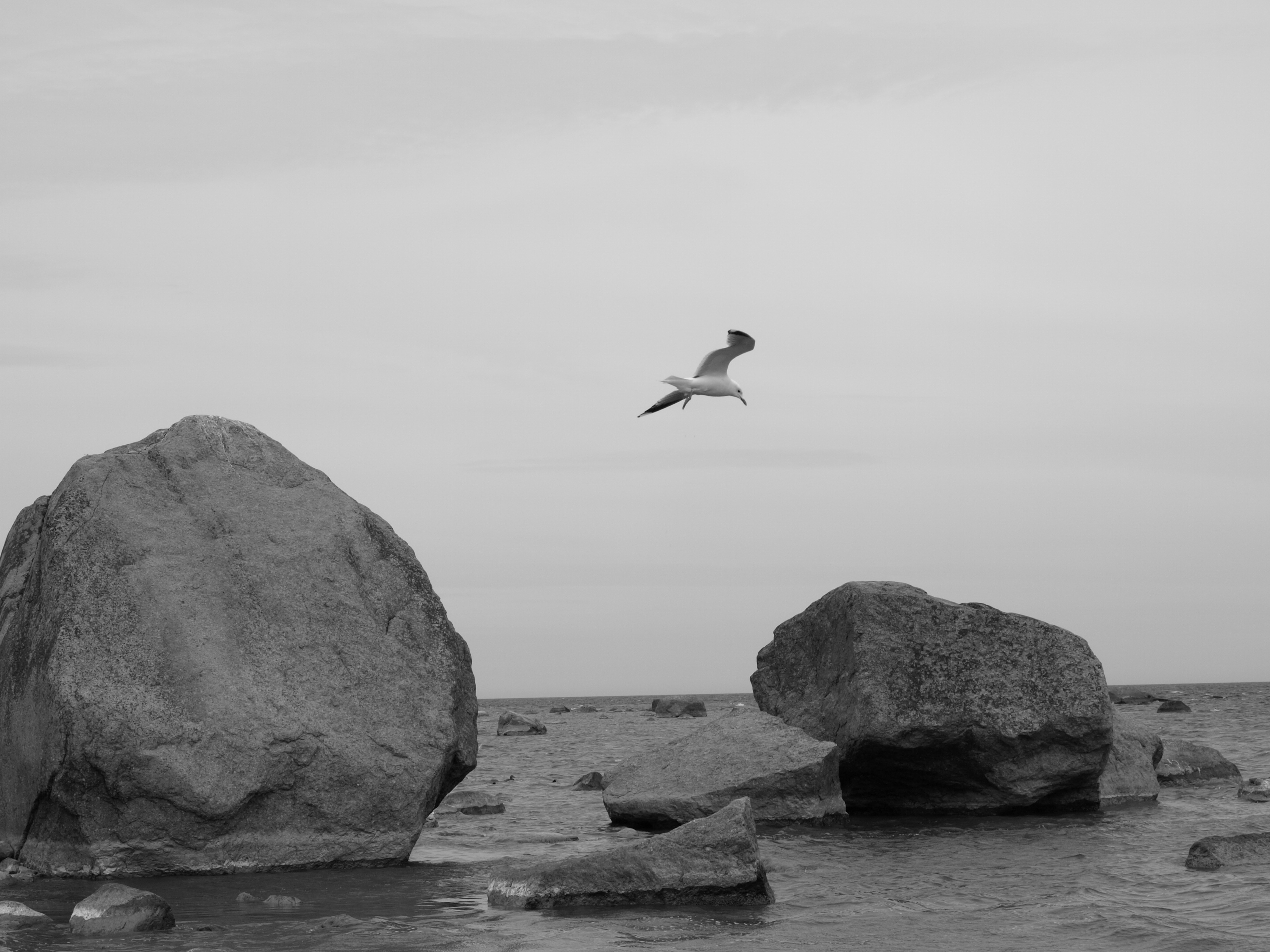 Vana- Jüri kivid Käsmus